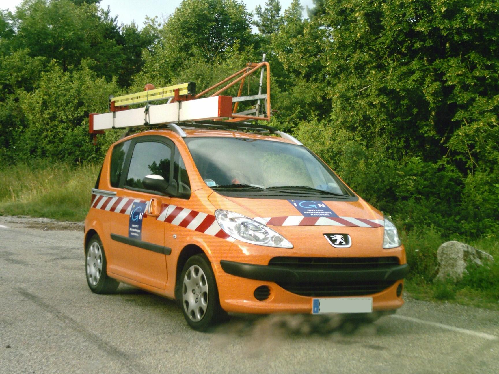 Véhicule de l'Institut géographique national (France)